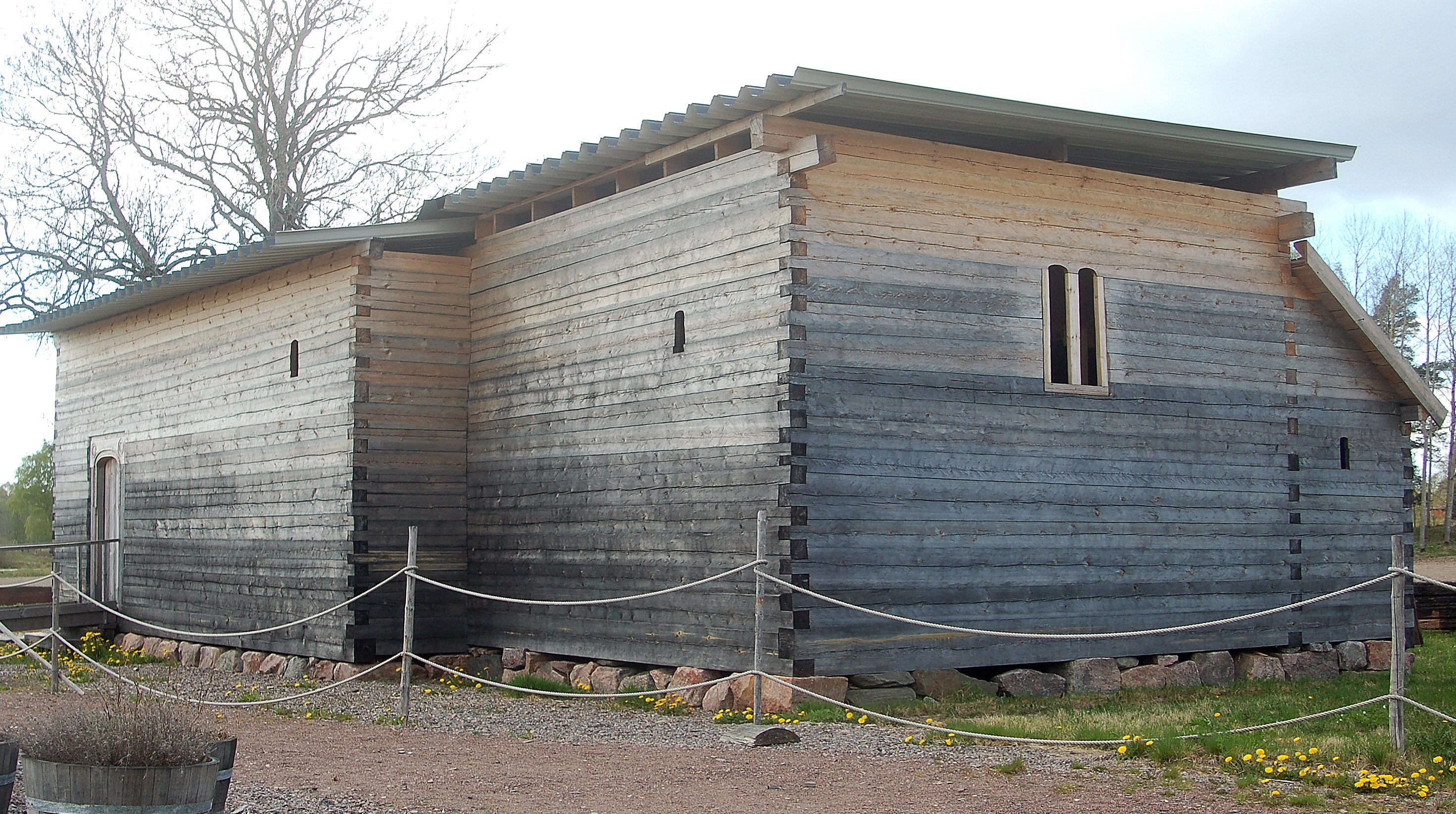 Rekonstruktion av Södra Råda gammla kyrka